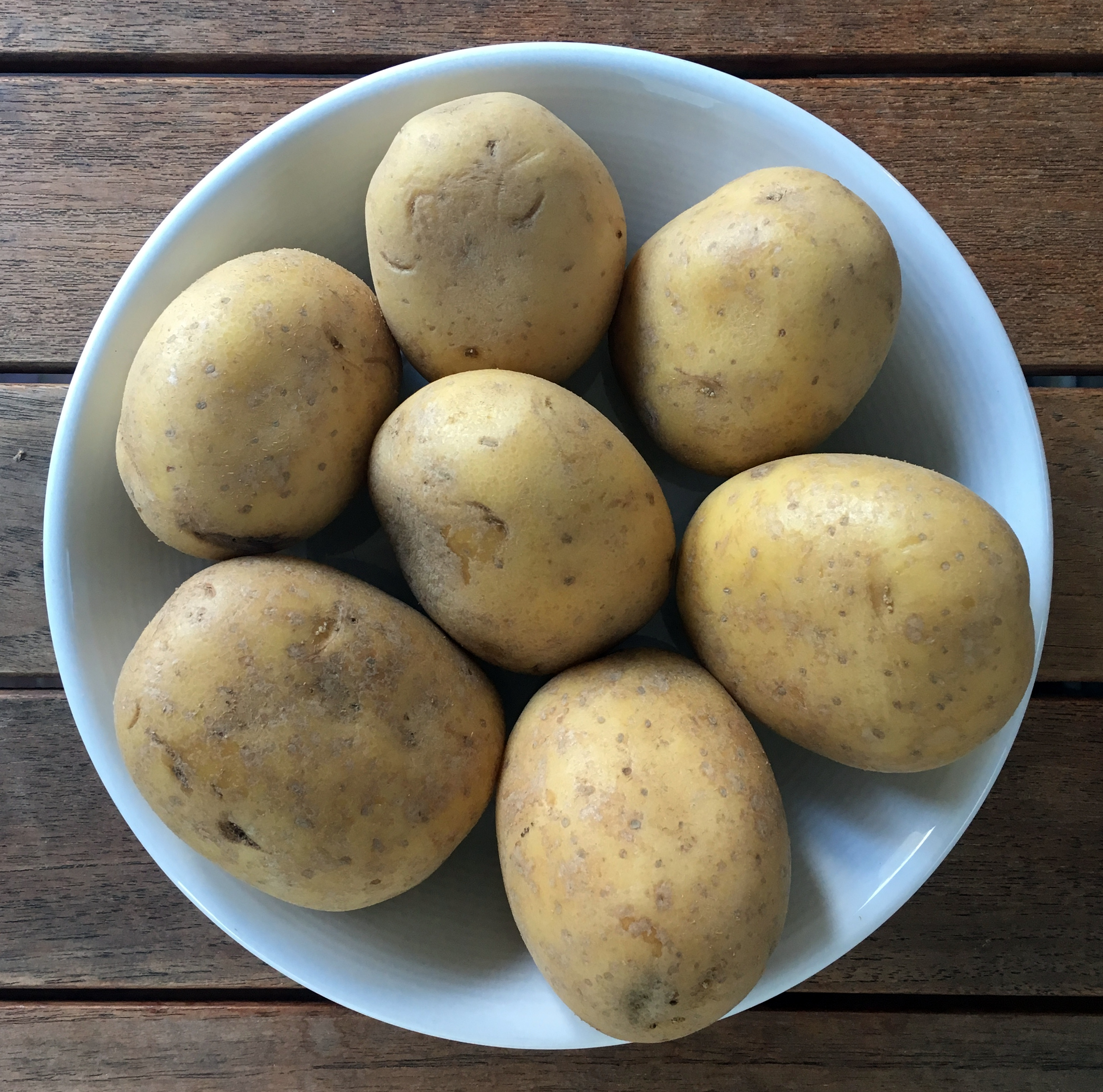 Kartoffelsorte Belana (festkochend)